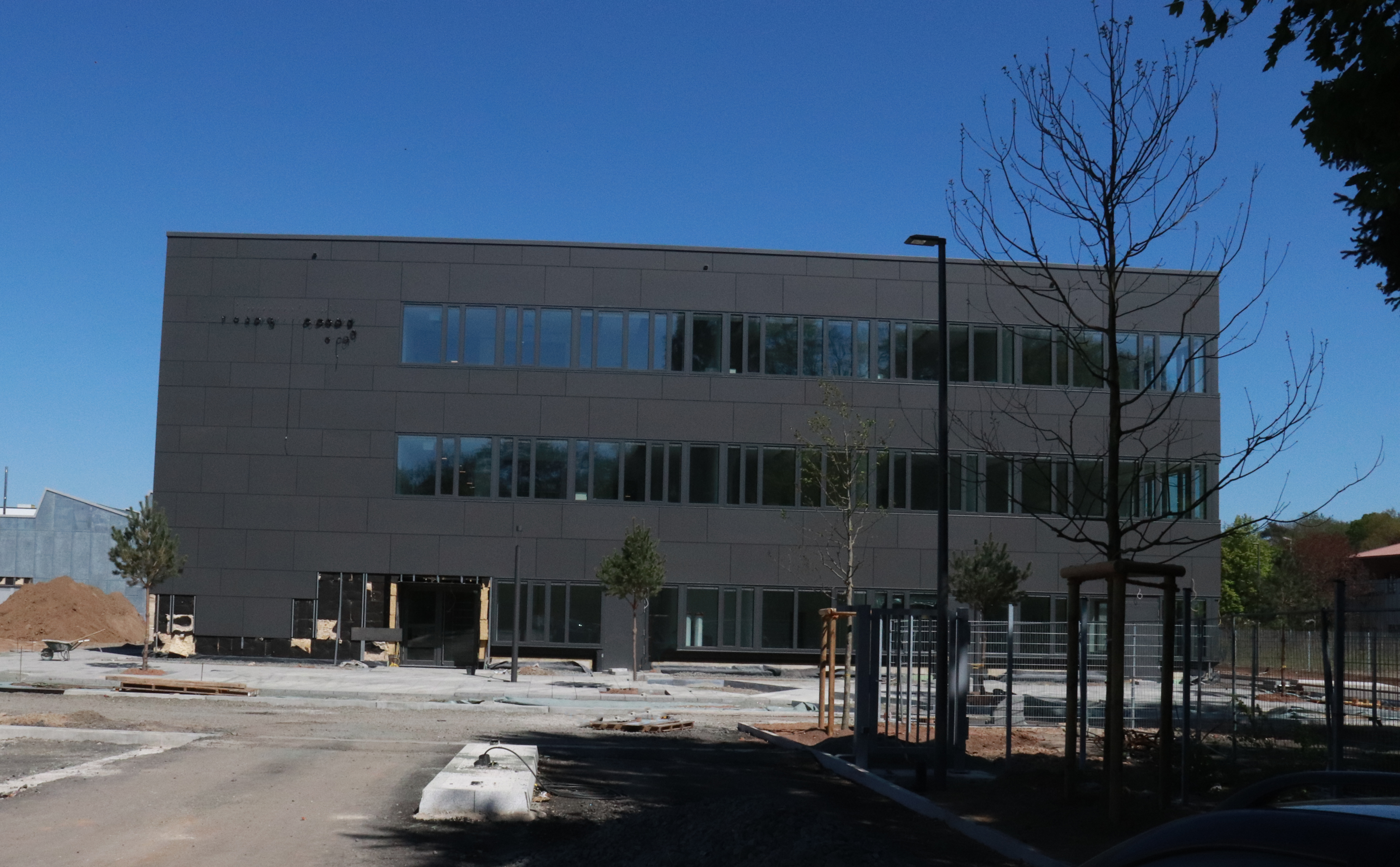 Neubau des Fraunhofer IWKS in Hanau